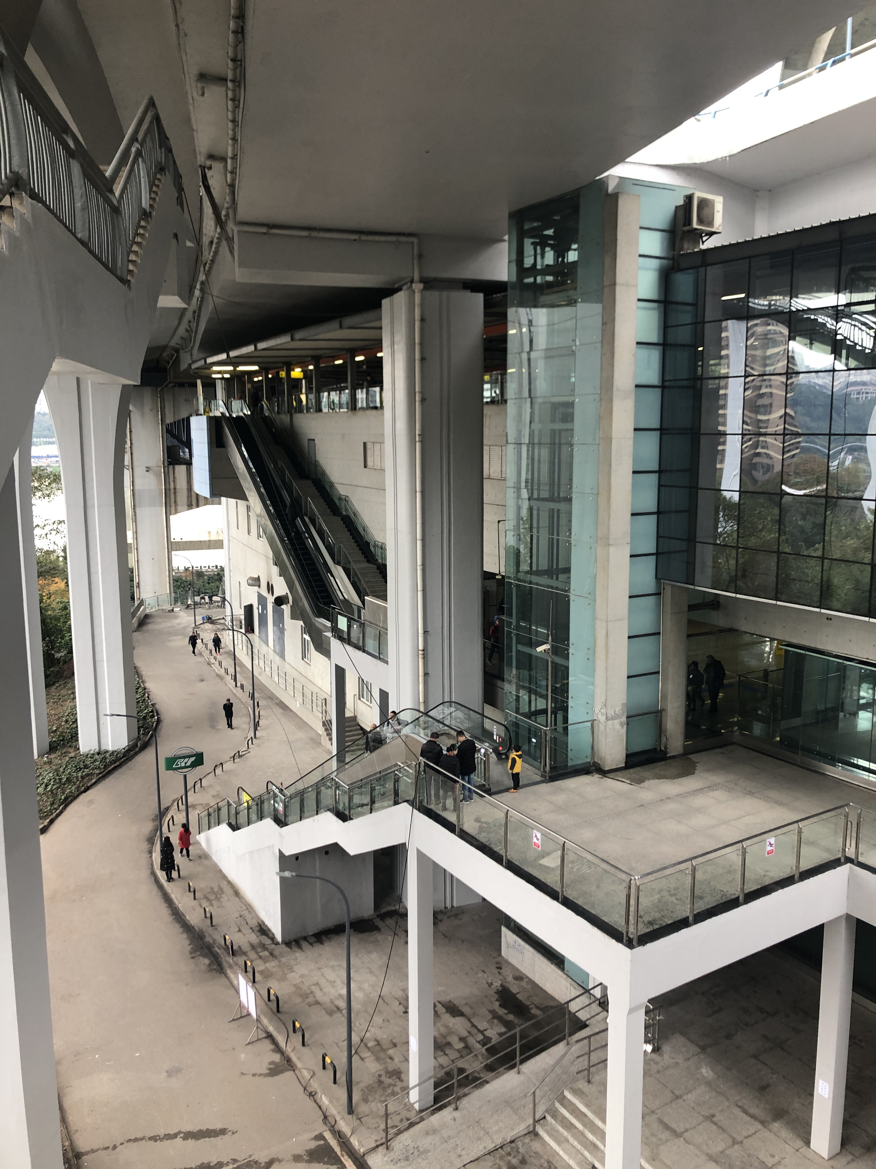 中文（中国大陆）: 3号线铜元局站的出口落差，左下角扶梯可延伸至江边，天桥可至菜园坝大桥